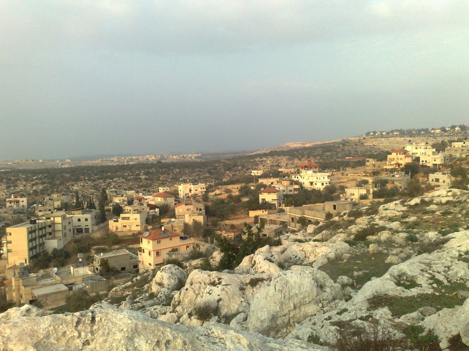 قرية سرطة